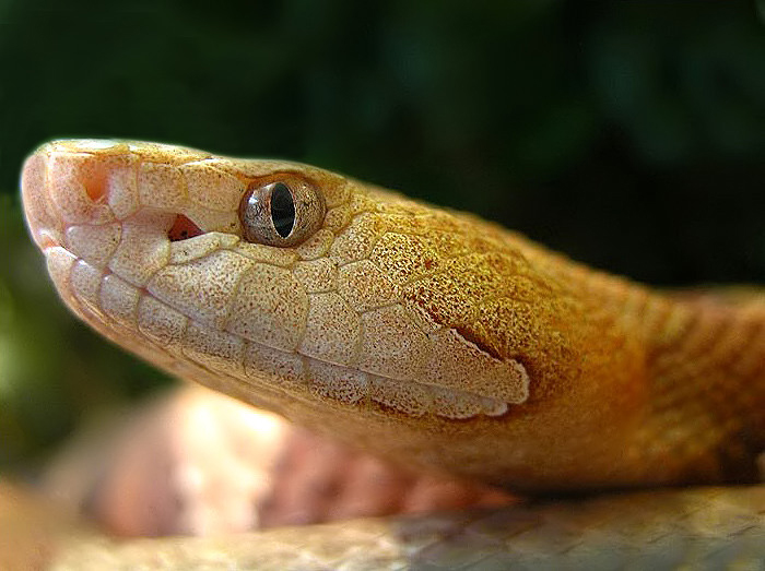 Motiv: Nordamerikanischer Kupferkopf (Agkistrodon contortrix)